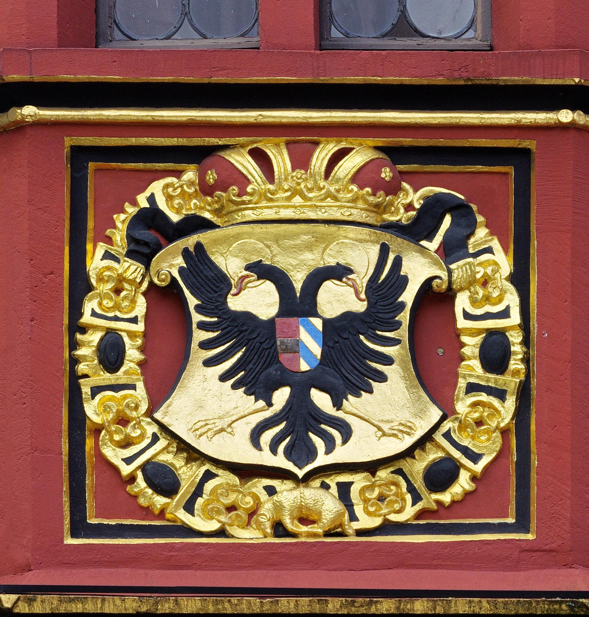 Freiburg im Breisgau, Historisches Kaufhaus, linker Erker, Wappen von Ländern unter der Regierung Kaiser Ferdinands I., 3. Wappen: Reichsadler mit gespaltenem Brustschild für das Erzherzogtum Österreich und das Herzogtum Burgund